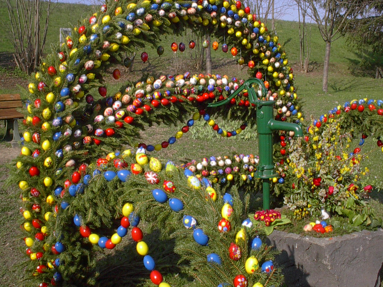 Osterbrunnen an deer Josefskapelle